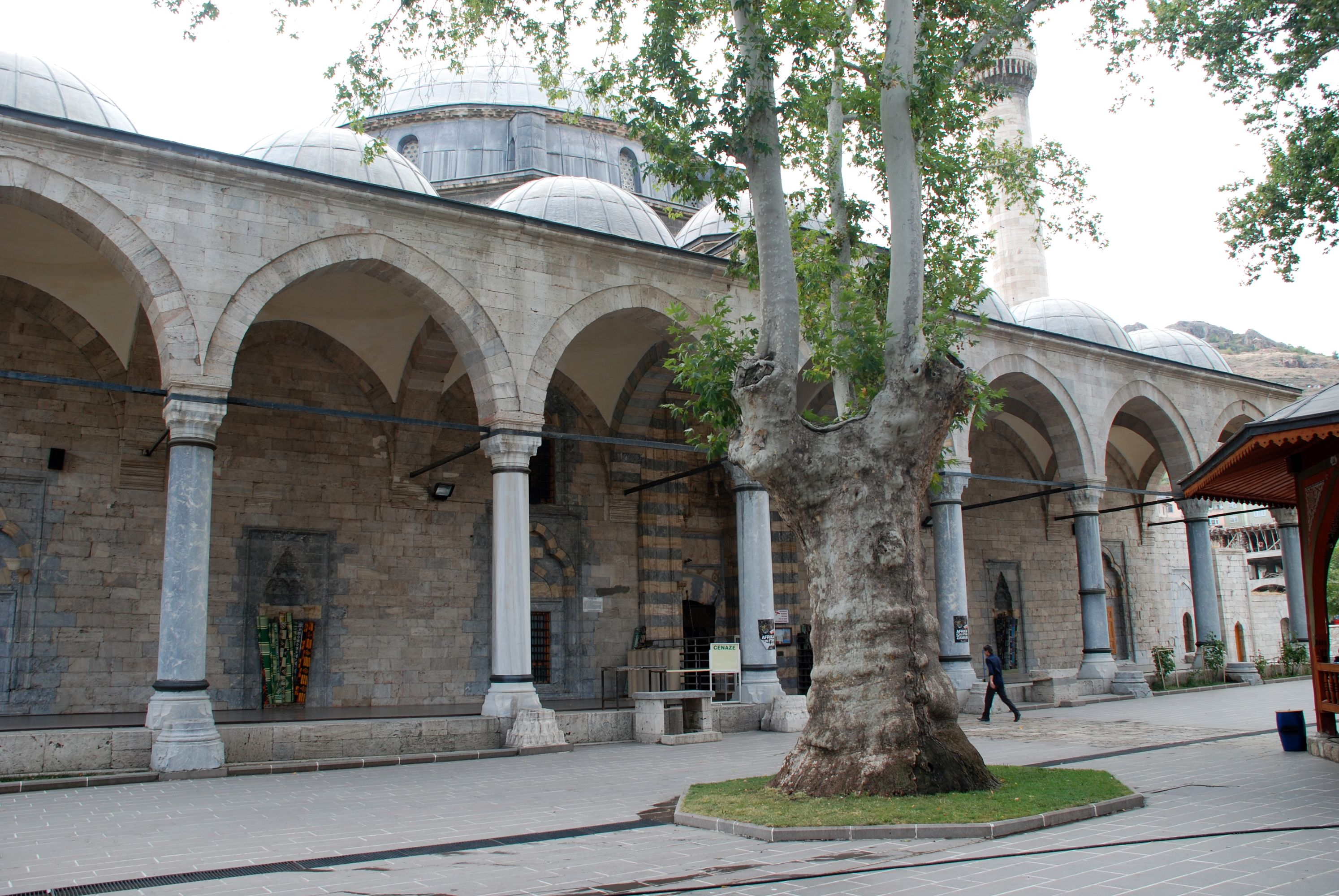 Tokat, Ali Pasha mosque